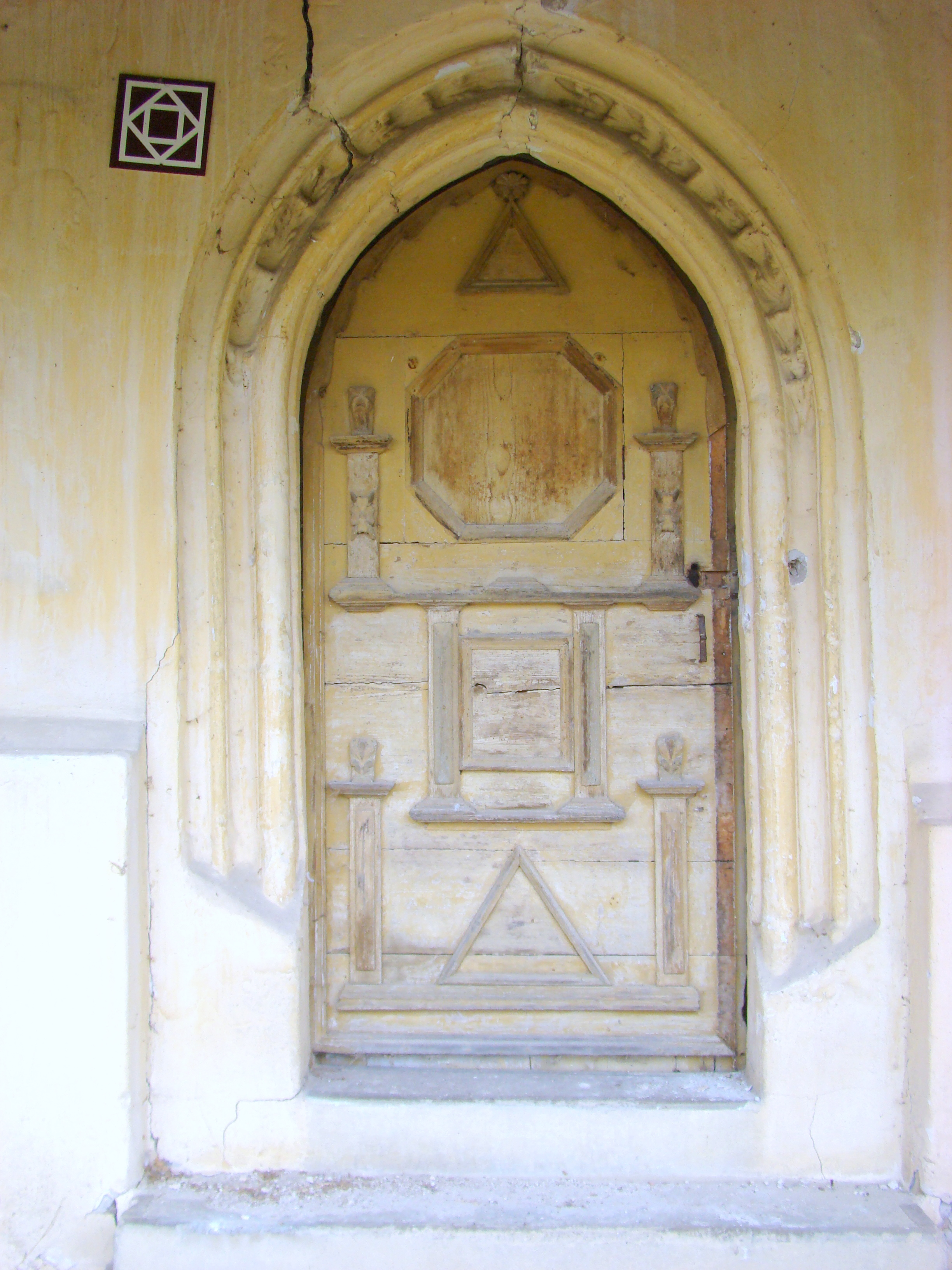 Biserica evanghelică, sat Veseuș; comuna Jidvei, județul Alba 01